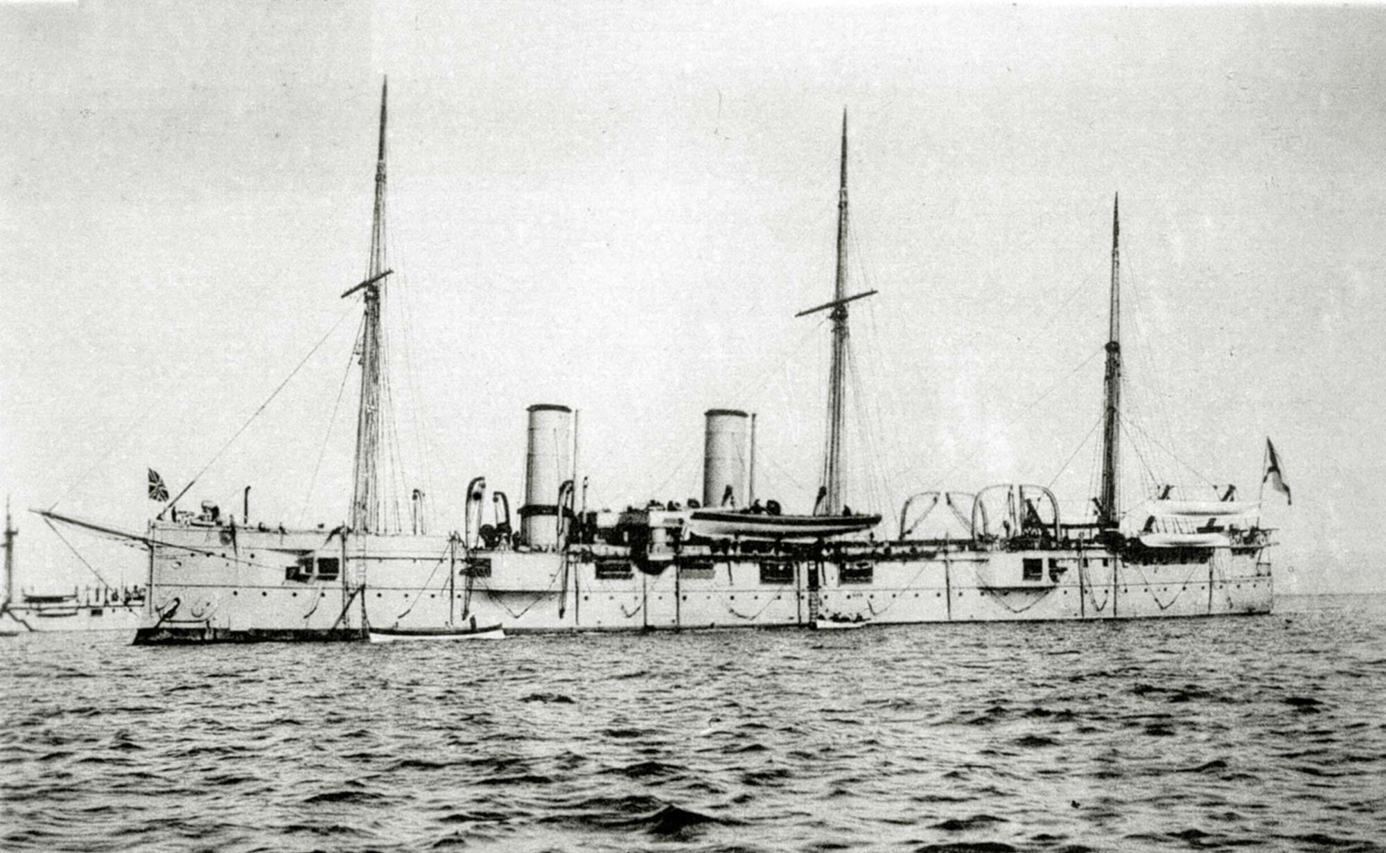 Крейсер "Владимир Мономах". Год неизвестен (около 1900)